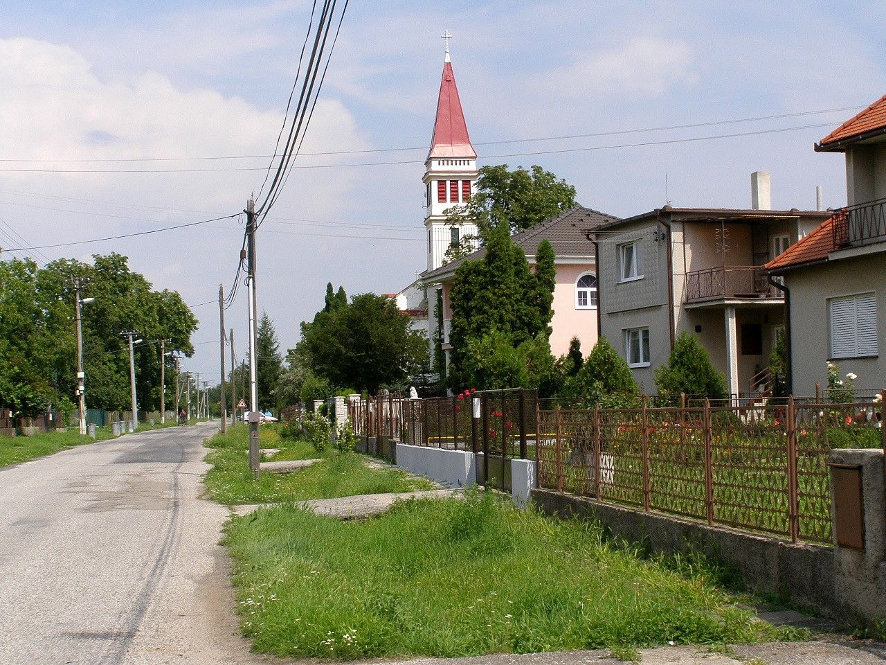 Pohľad na hlavnú ulicu v Ondrejovciach s kostolom sv. Ondreja